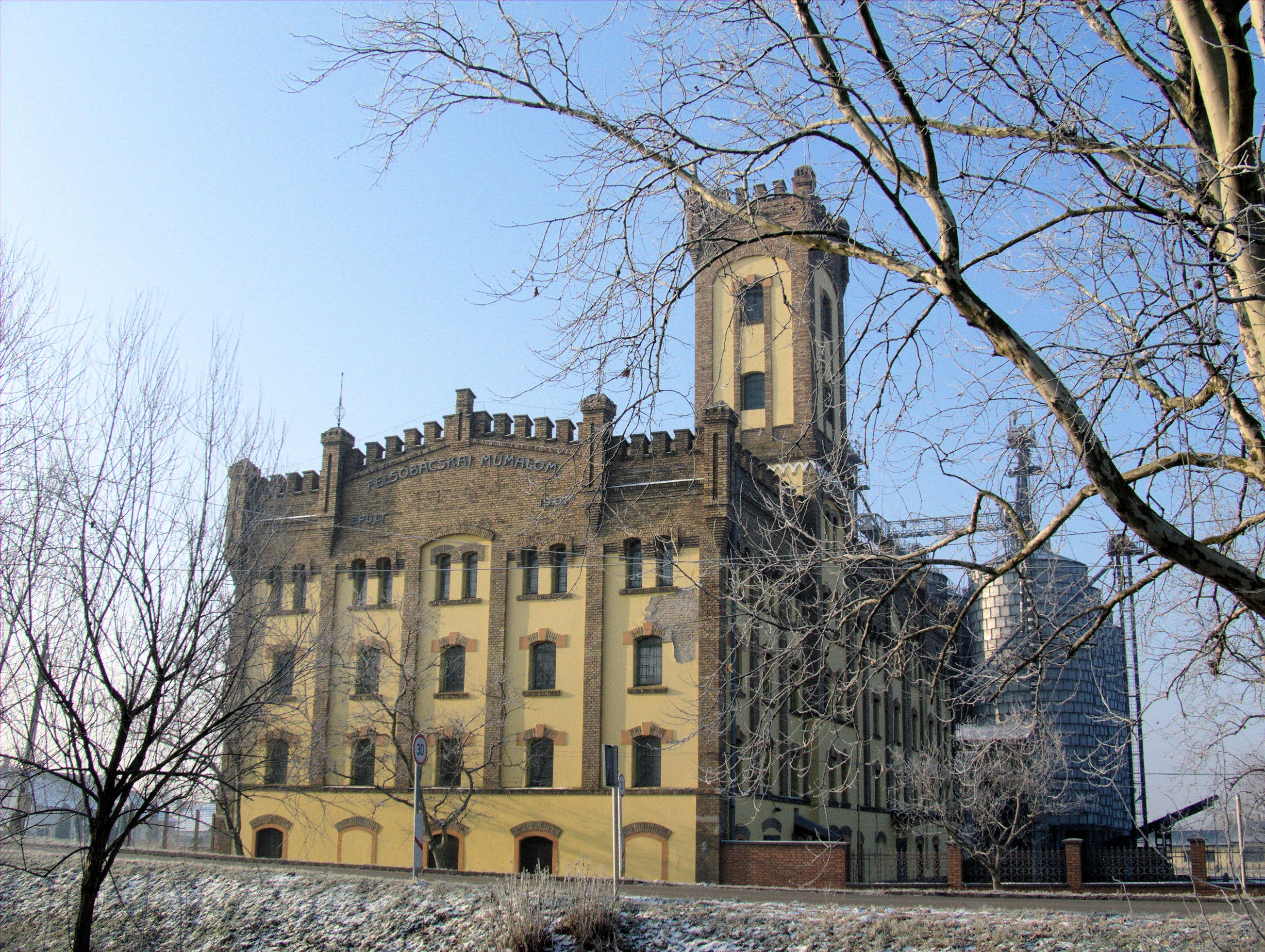 A Felső-Bácskai Műmalom Jánoshalmán. Ipari műemlék. Épült 1904 és 1907 között